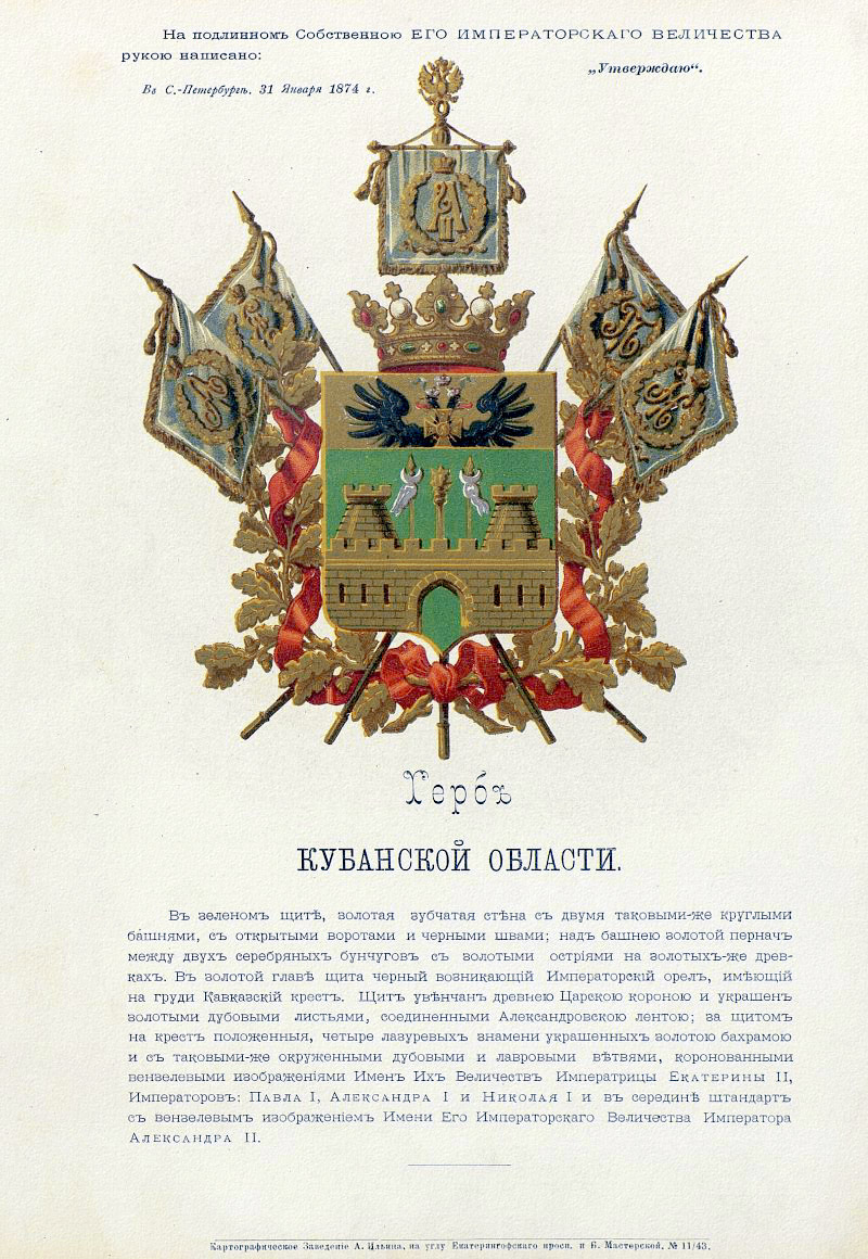 Official Russian Empire coat of arms Kuban Oblast. Герб Российской Империи Кубанской области с официальным описанием в Гербовнике Бенке. Утверждён Императором Всероссийским Александром Вторым в 1874 году.